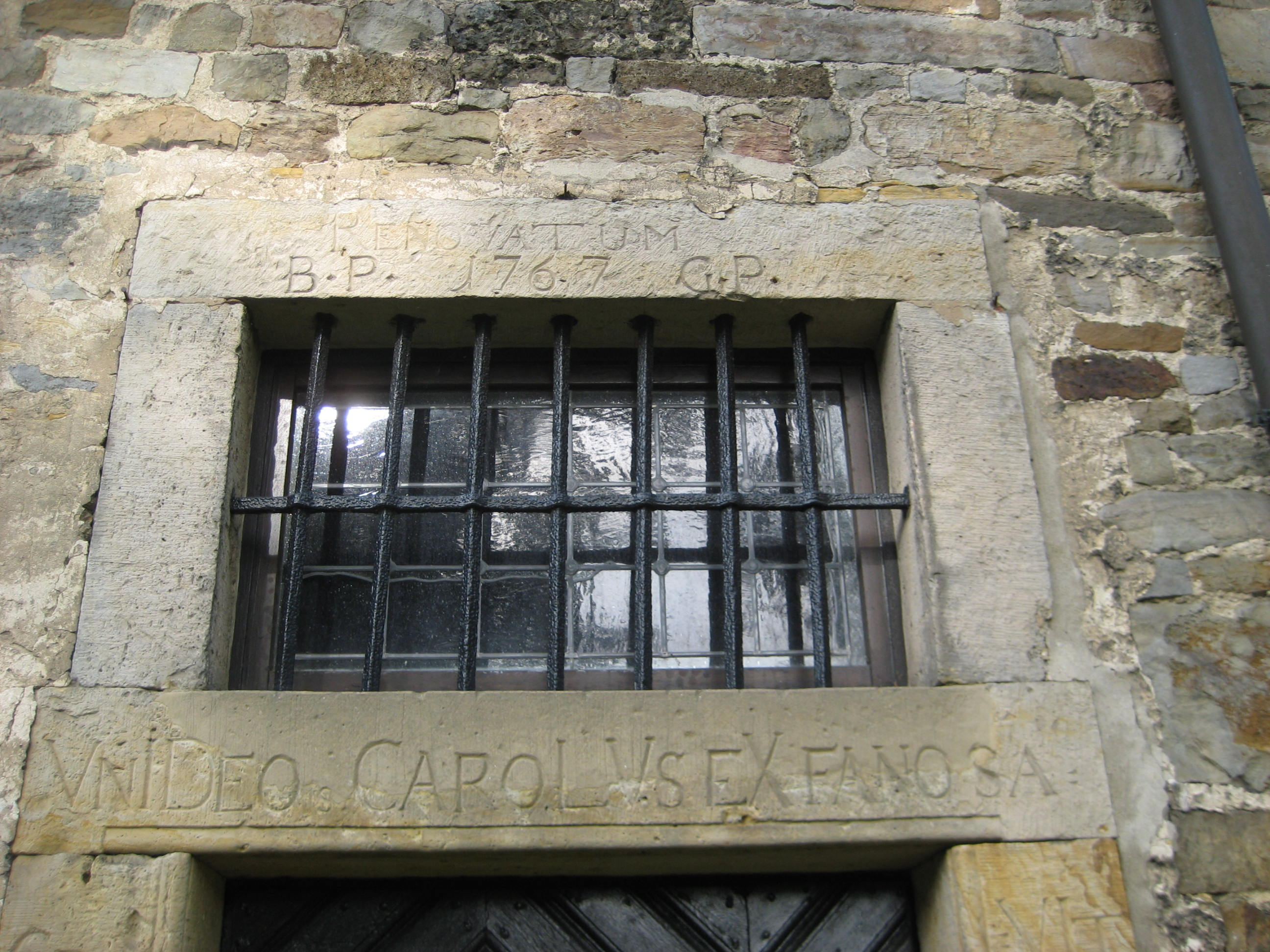 Inschrift über der südlichen Kirchentür, Alte St. Alexanderkirche, Wallenhorst